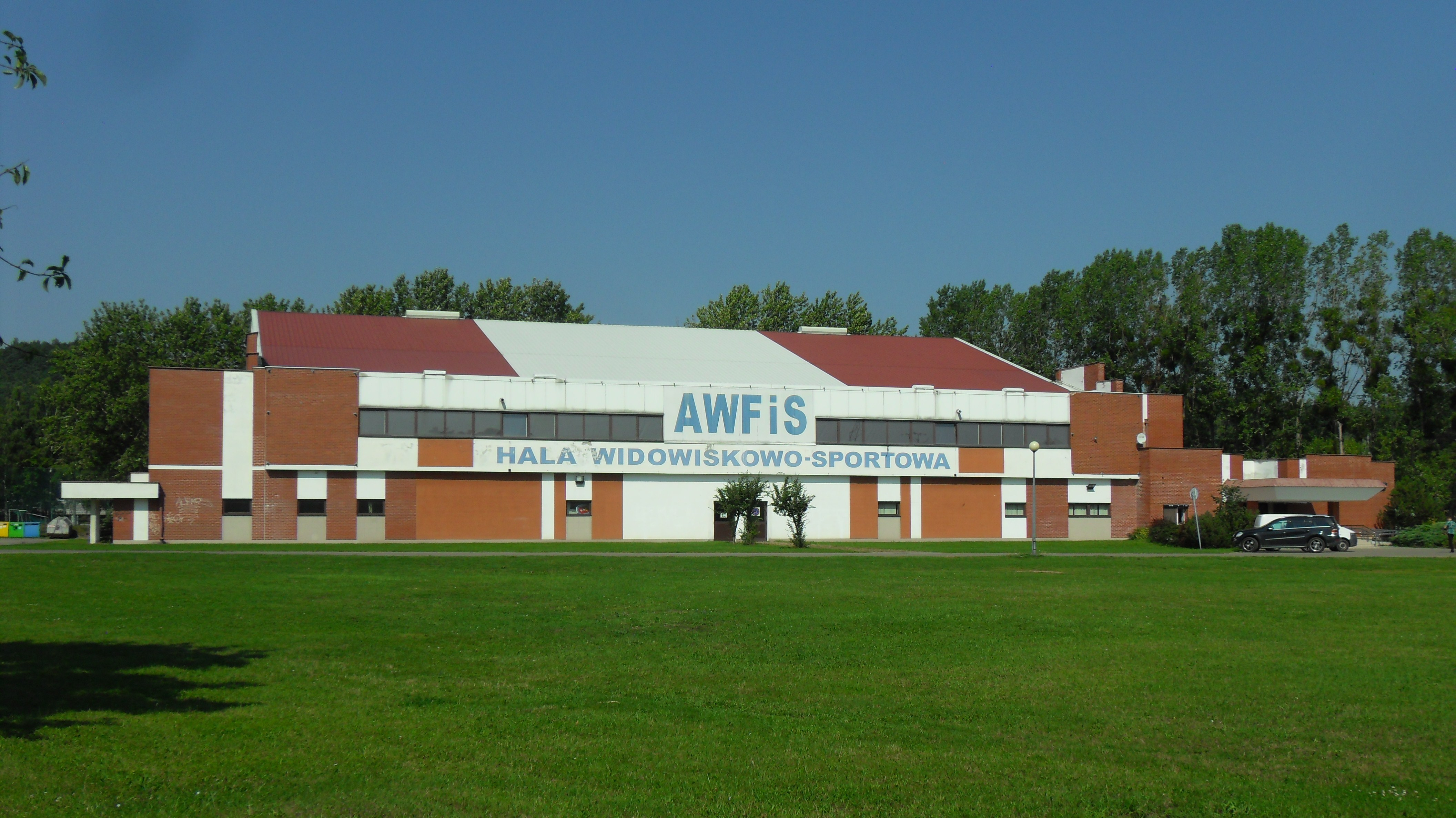 Gdańsk Oliwa. Akademia Wychowania Fizycznego i Sportu, Hala Widowiskowo-Sportowa.